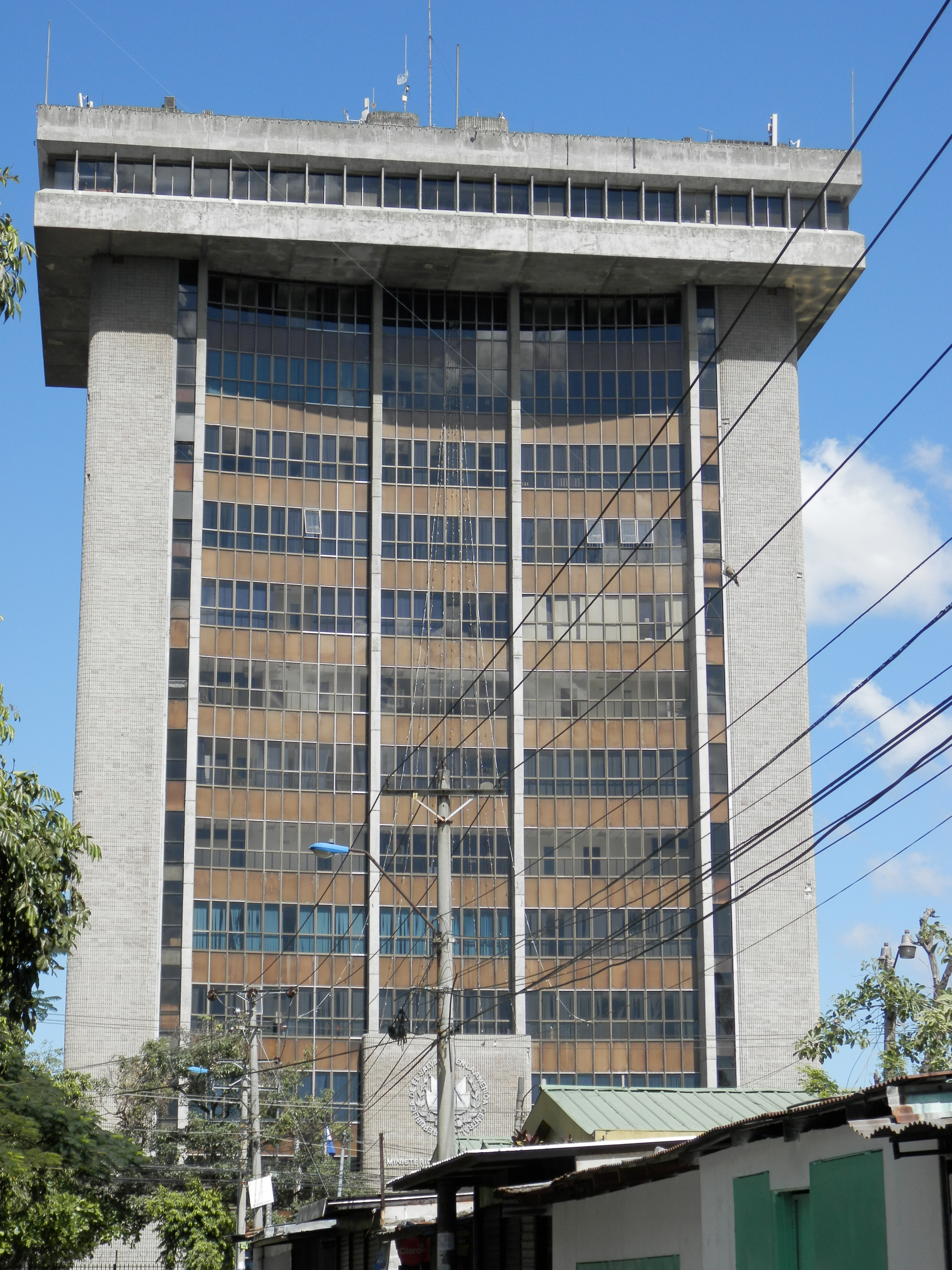 Torre Ministerio de Gobernación